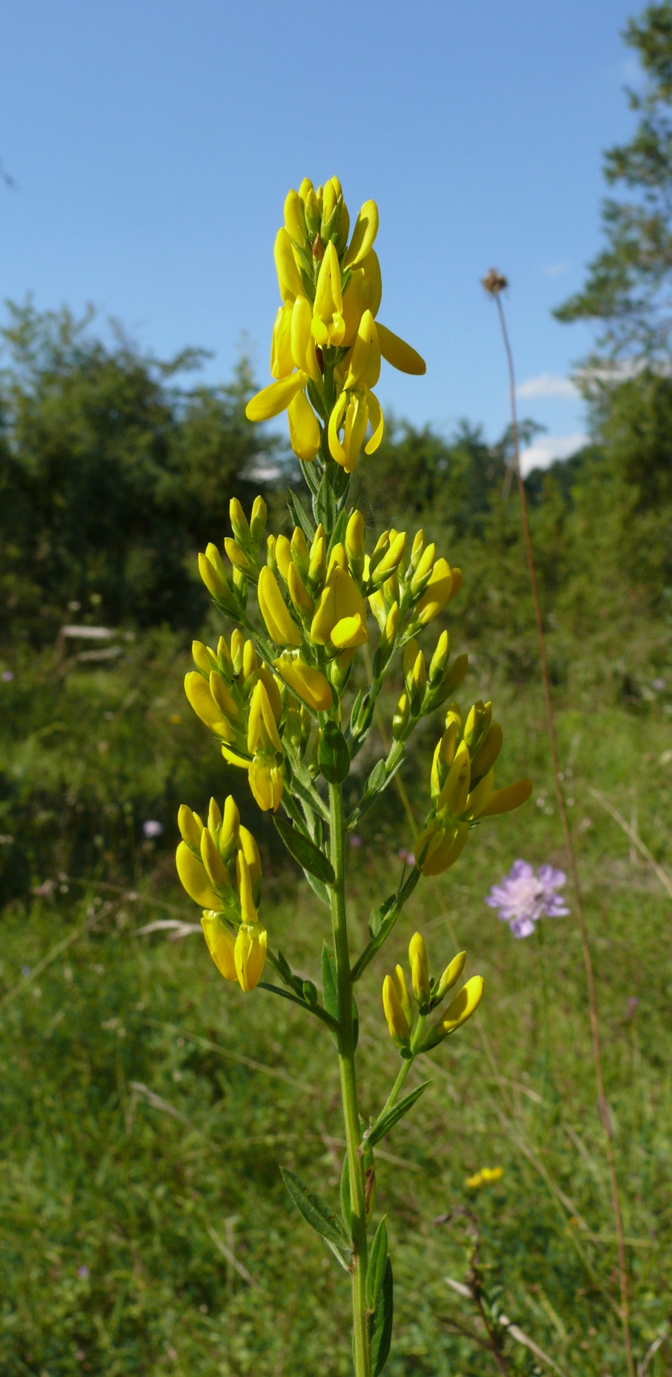 Genista tinctoria, Schwäbisch-Fränkische Waldberge, Germany